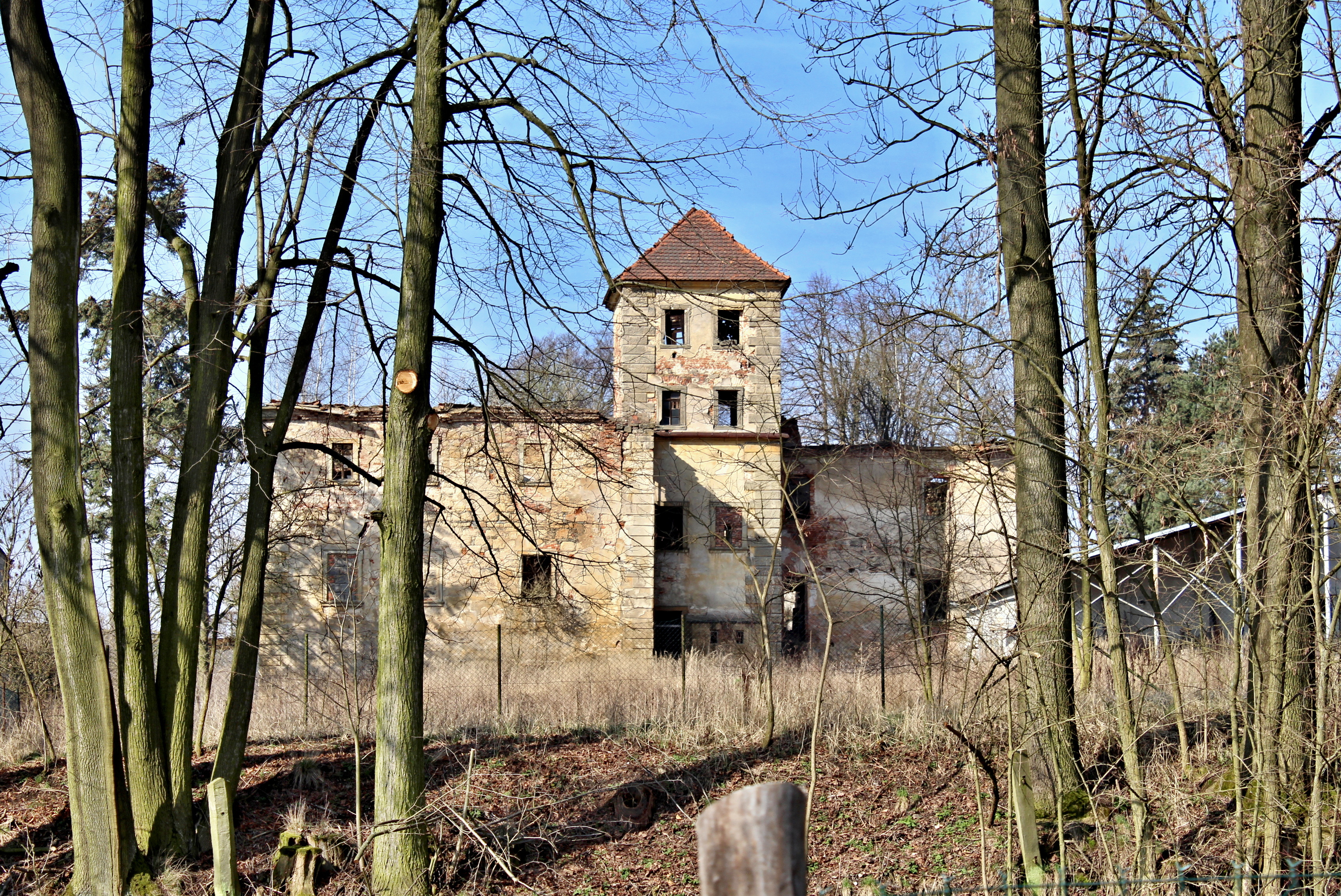 Zámek Dolní Valtinov